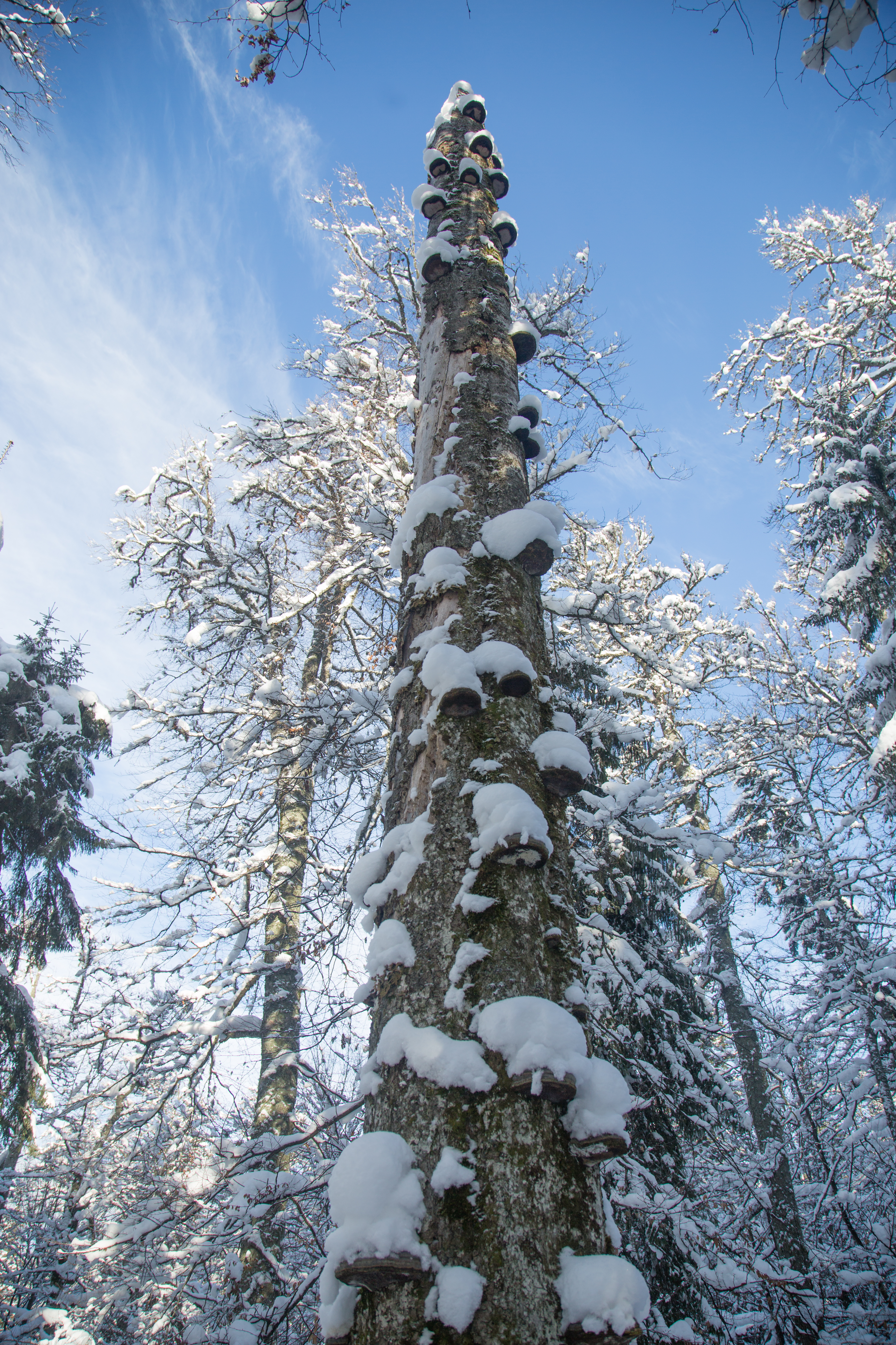 Всохлий стовбур буку з трутовиками